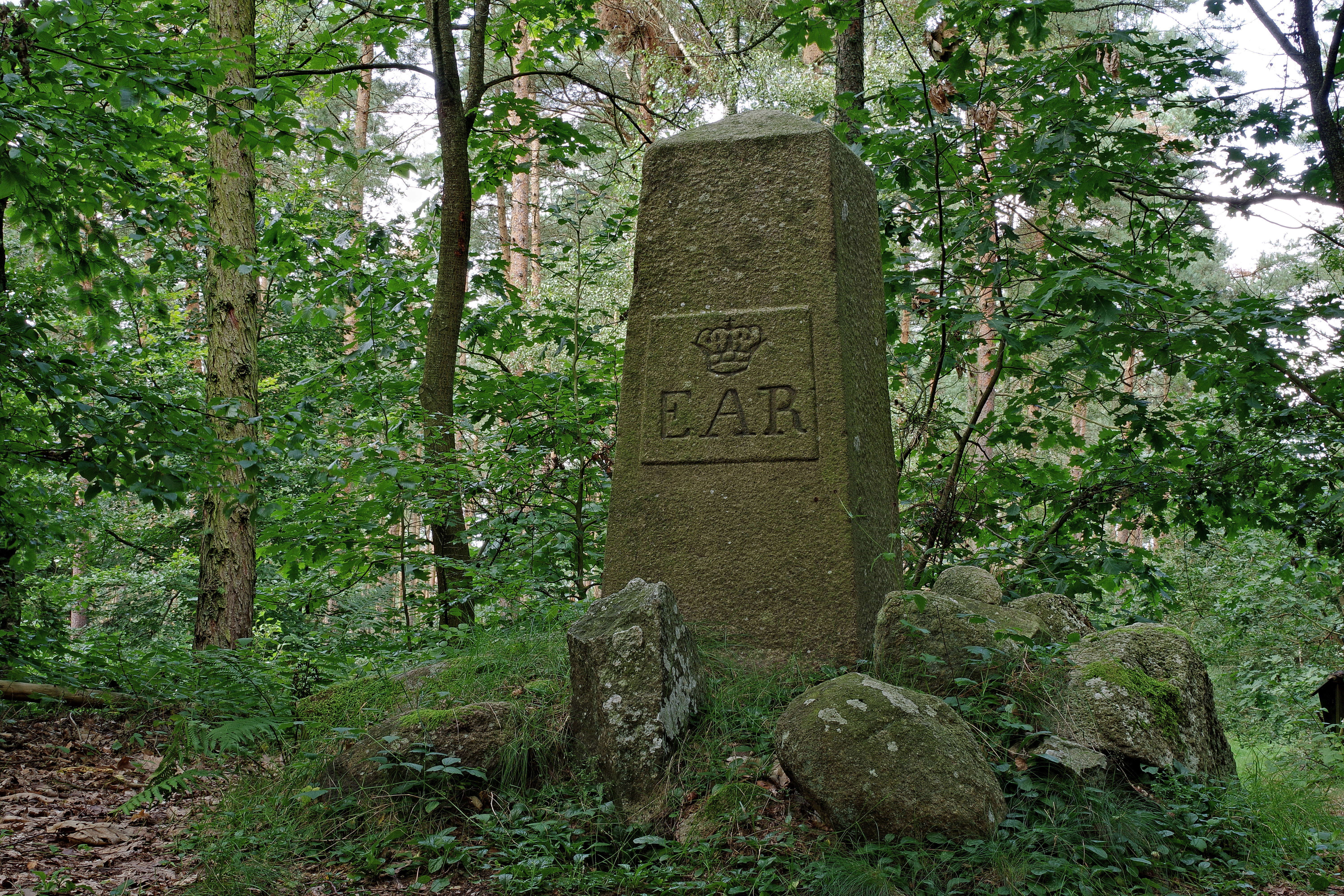 Ernst-August-Rex-Stein auf dem Telegraphenberg im Ortsteil Breetze der Stadt Bleckede - Ansicht aus Südsüdost. Fast mannshoher Granitobelisk, der die Inbesitzname der von den Breetzer Bauern an den königlichen Domänenfiskus verkauften Heideflächen durch Ernst August I. (König von Hannover, Herzog von Braunschweig-Lüneburg von 1837-1851) im Jahre 1847 dokumentiert. Krone und die Initalen verweisen auf den neuen, königlich-herzöglichen Eigentümer: EAR: Ernst August Rex. Mit dem Verkauf konnten die Bauern die notwendigen Mittel aufbringen, um die auf ihren Höfen seit alters her lastenden Verpflichtungen nach der erfolgten Verkoppelung im Jahre 1838 zu löschen. (Quelle: - abgerufen am 30.09.2017) Der Stein ist als "Denkst." verzeichnet auf der Online-Karte unter: (einzustellende Hintergrundkarte: DGK5 historisch).